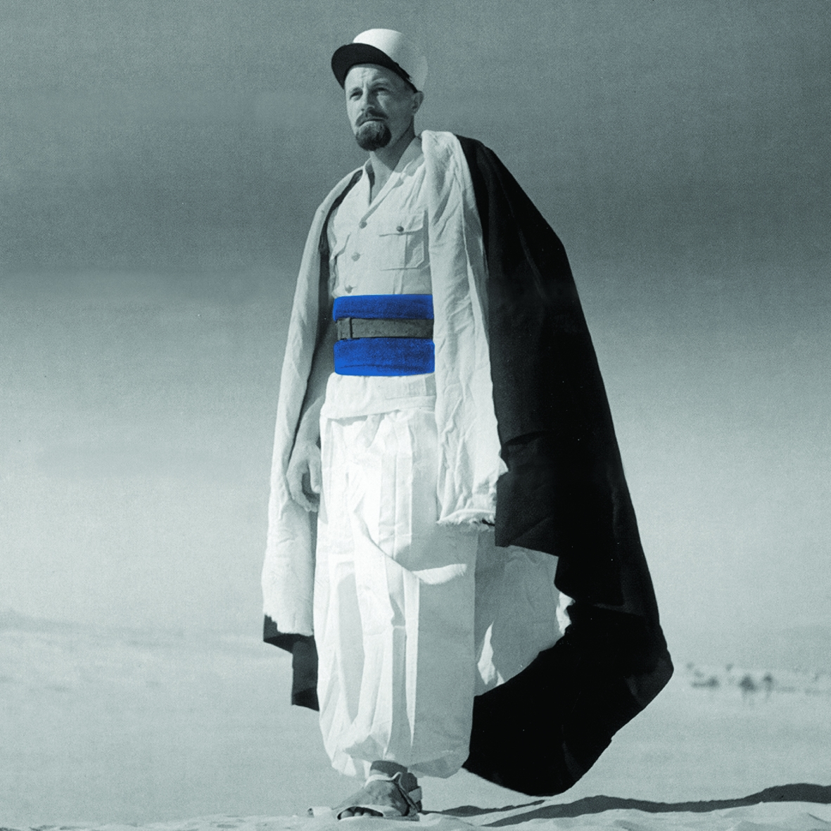 tenue de parade des compagnies sahariennes portées de la Légion étrangère.Soldiers name: Lichtwarck